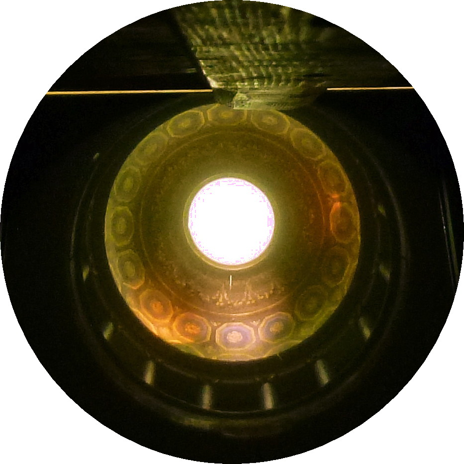 Modellen för Stora Haga slott med blick in i kupolen